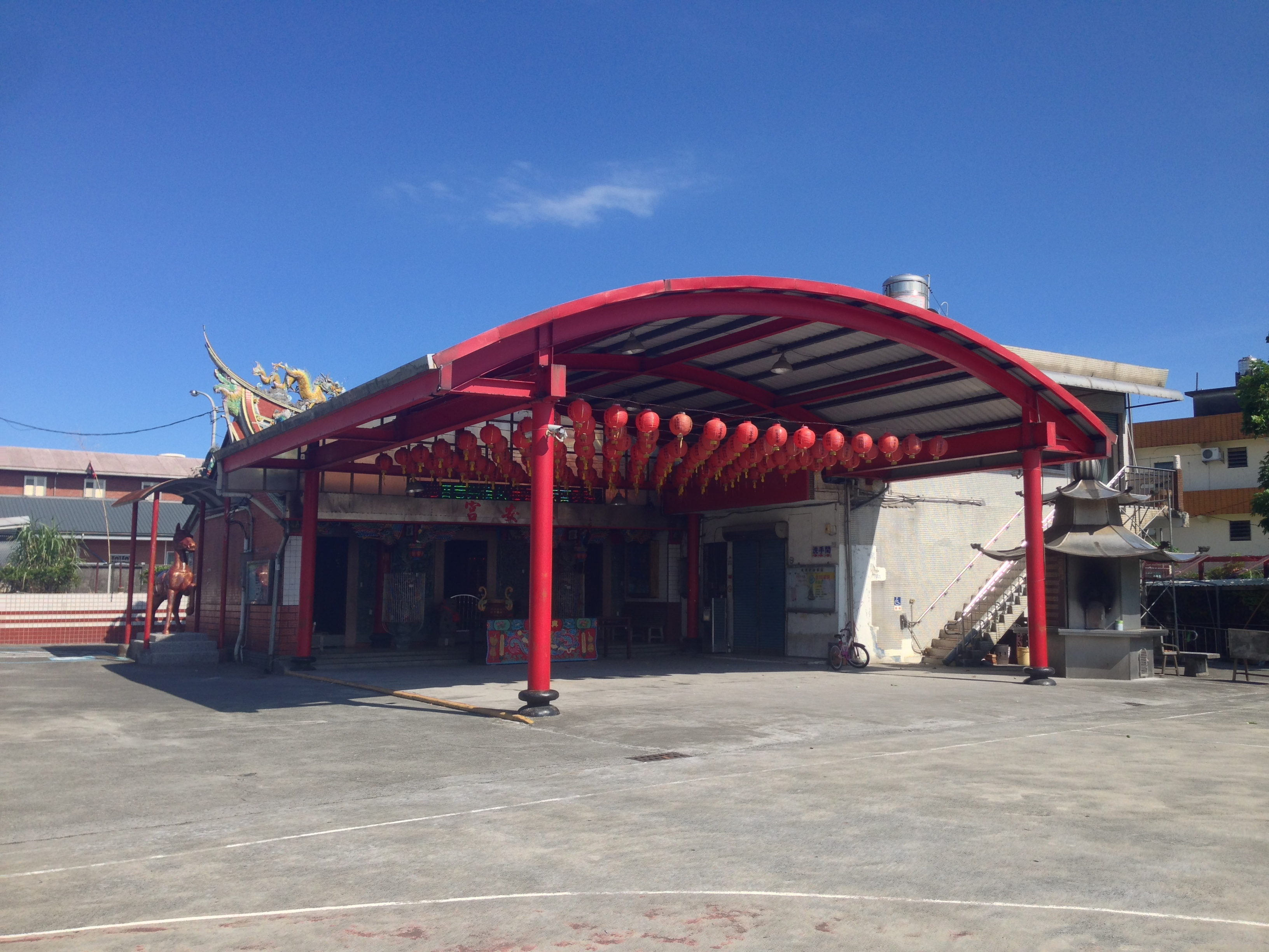 中文（台灣）: 挽善堂（成興興安宮）一景